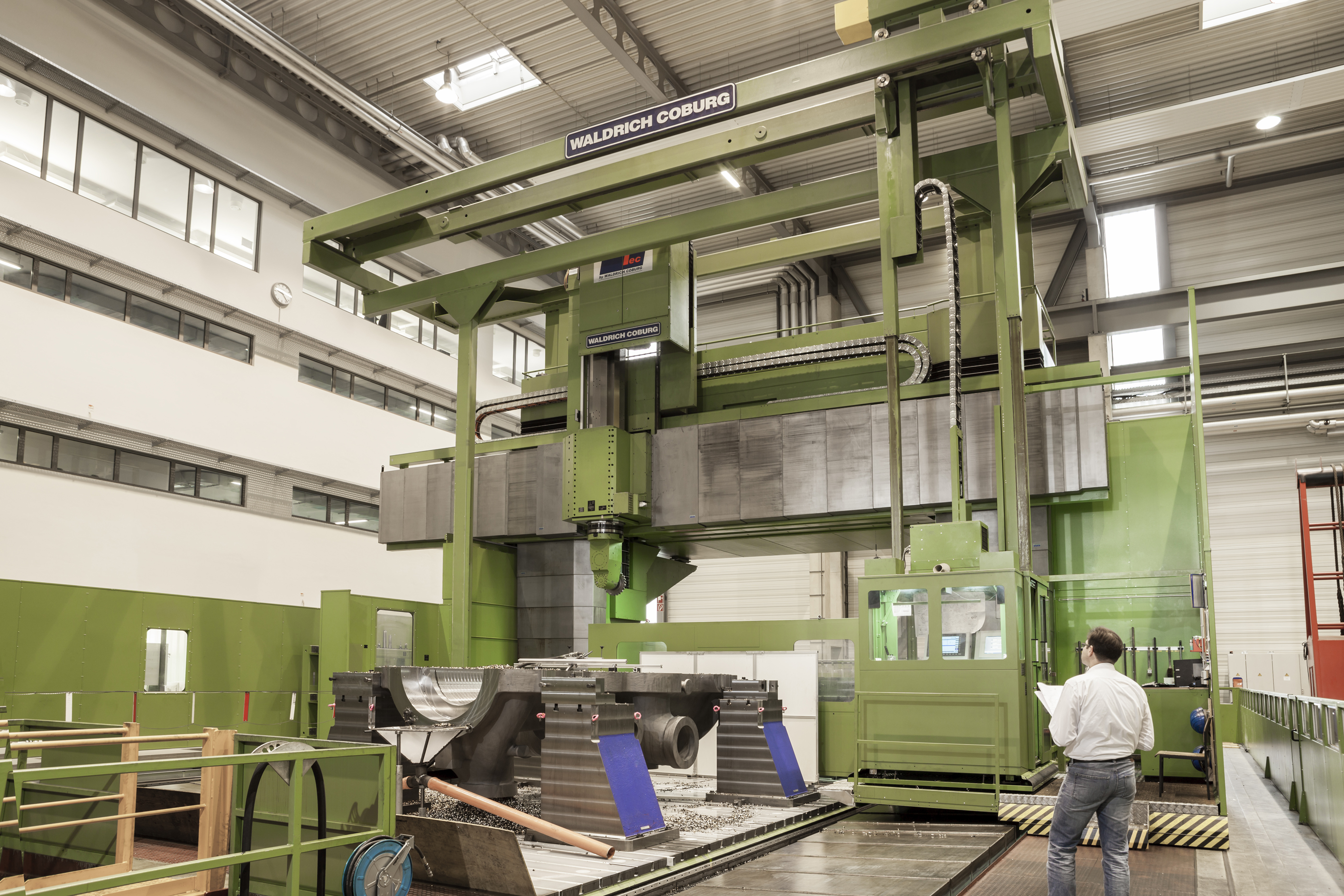 Gantry WALDRICH COBURG bei Siemens